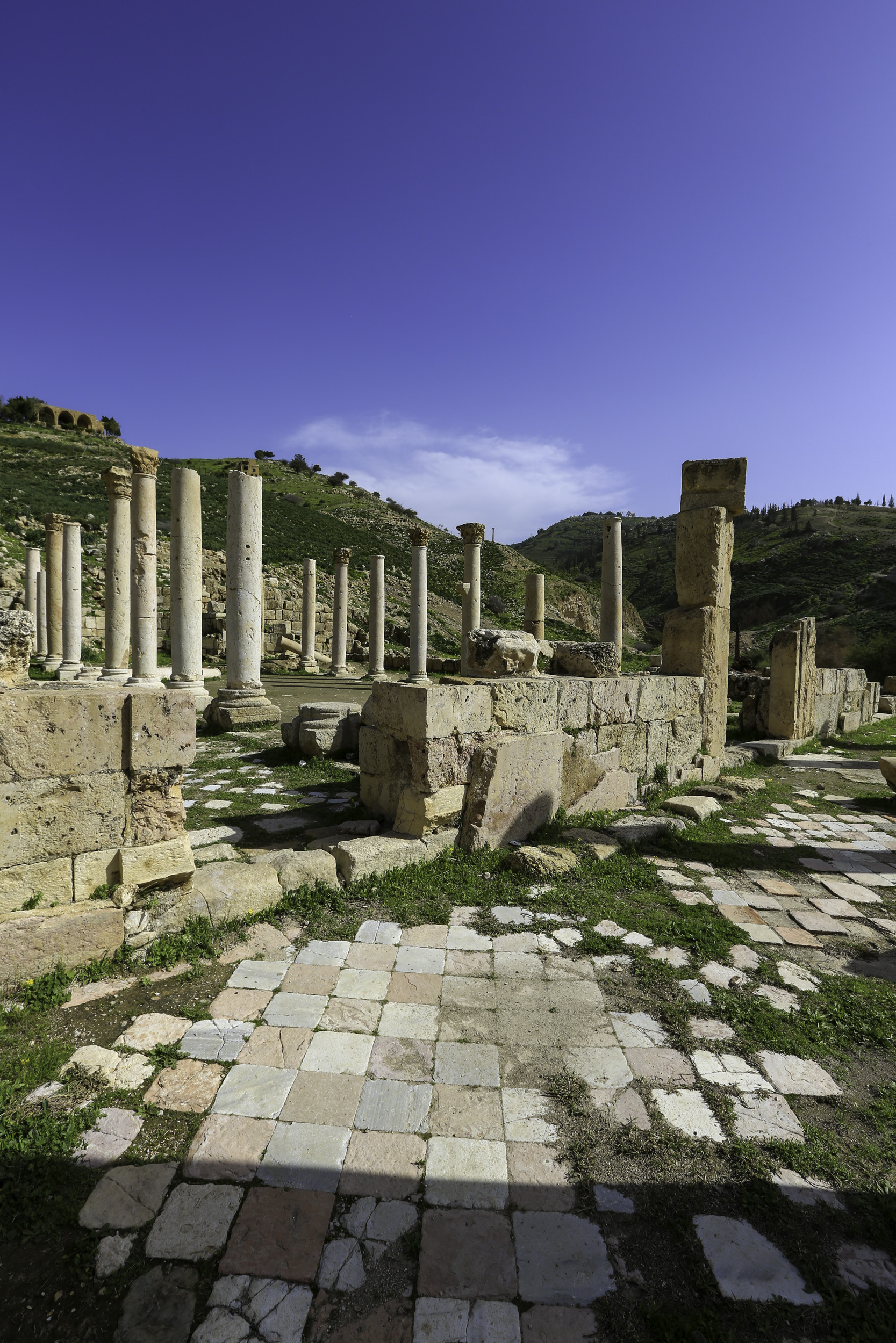 Pella (Byzantine Church Ruins)